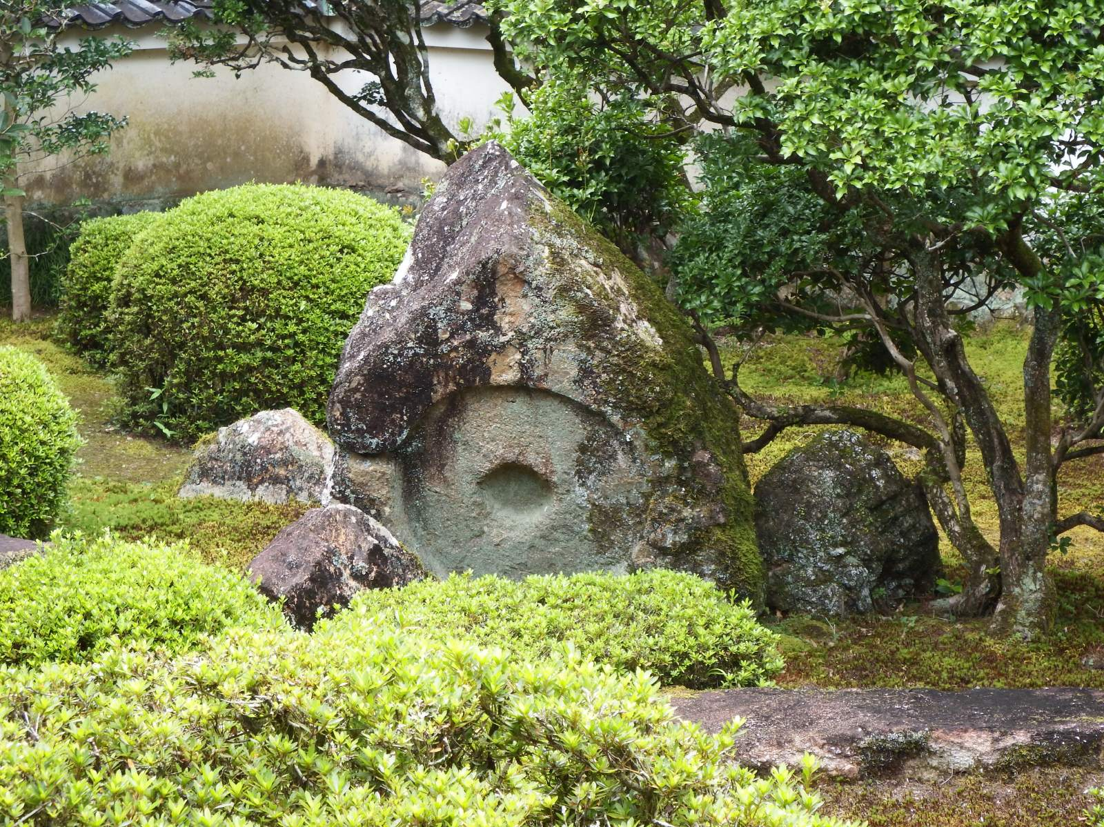 土佐国分寺の礎石